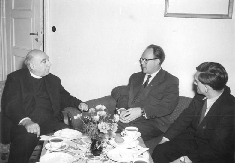 Zentralbild Sturm 29.9.1954 Ansprache im Schriftstellerverband der DDR mit polnischen und französischen Gästen UBz: Aussprache zwischen Abbé Boulier (links) Frankreich und dem Schriftsteller Harald Hauser (Bildmitte).